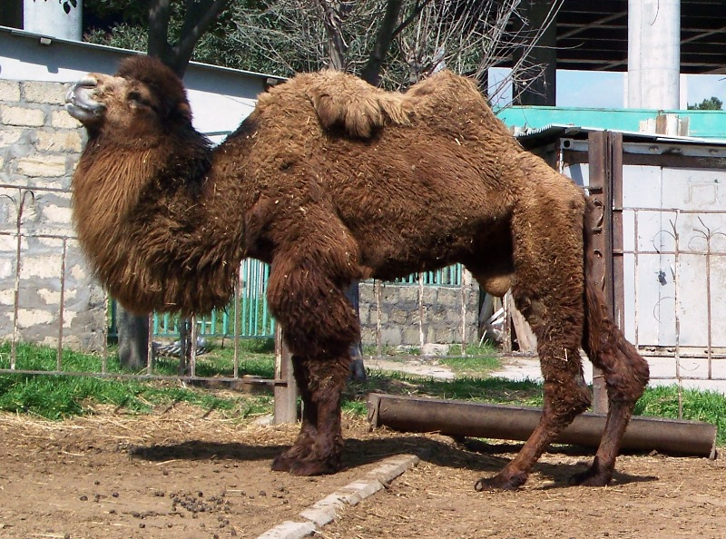 верблюд в бакинском зоопарке